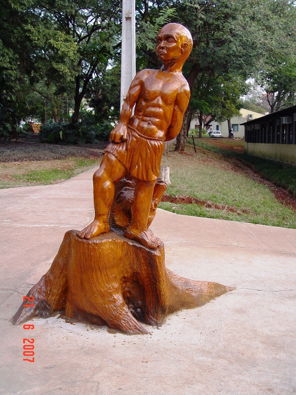 O Contemplador, obra de Monteiro, no campus da Universidade Estadual do Maringá (UEM)